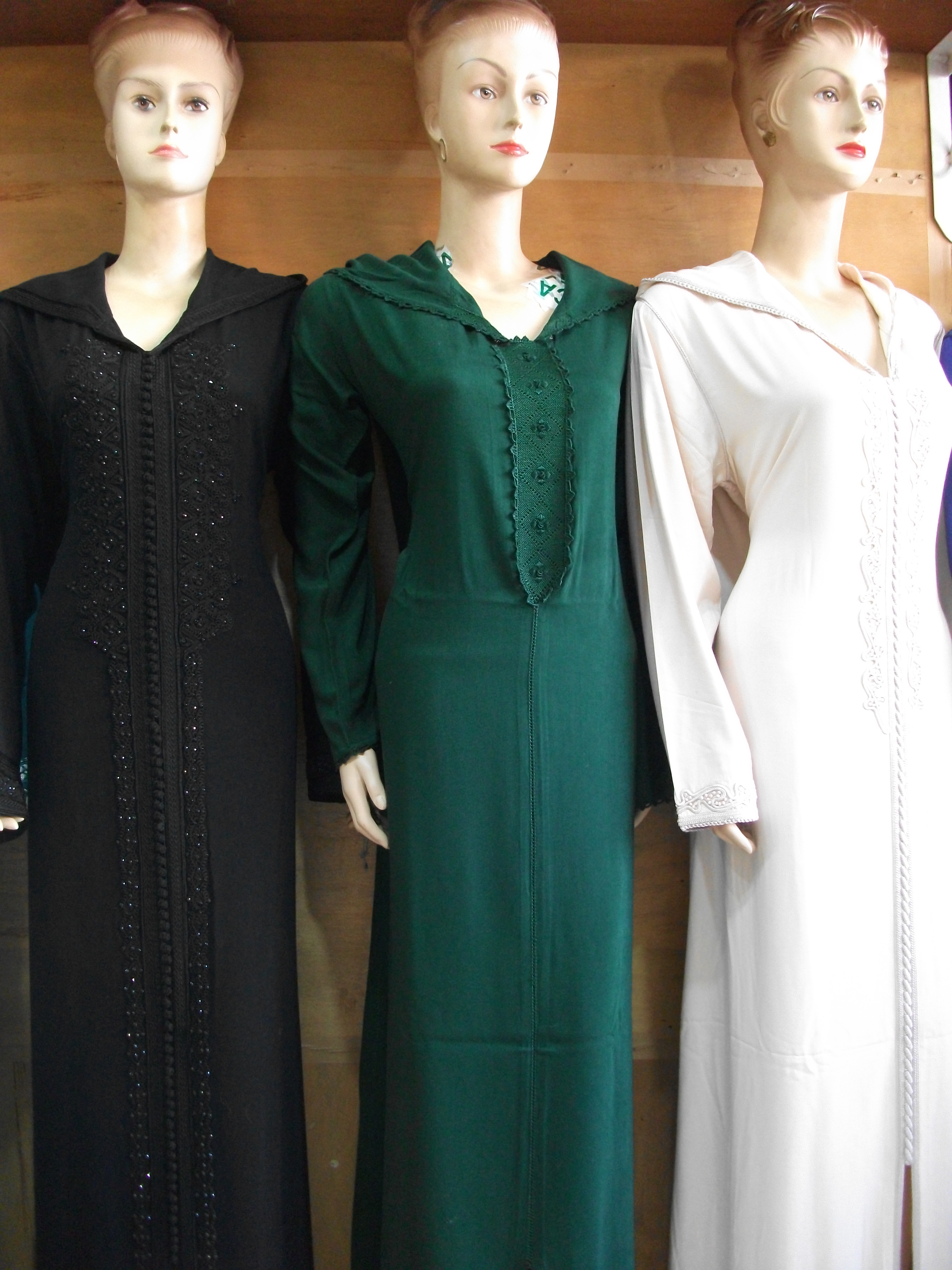 Djellabas ohne Stickereien